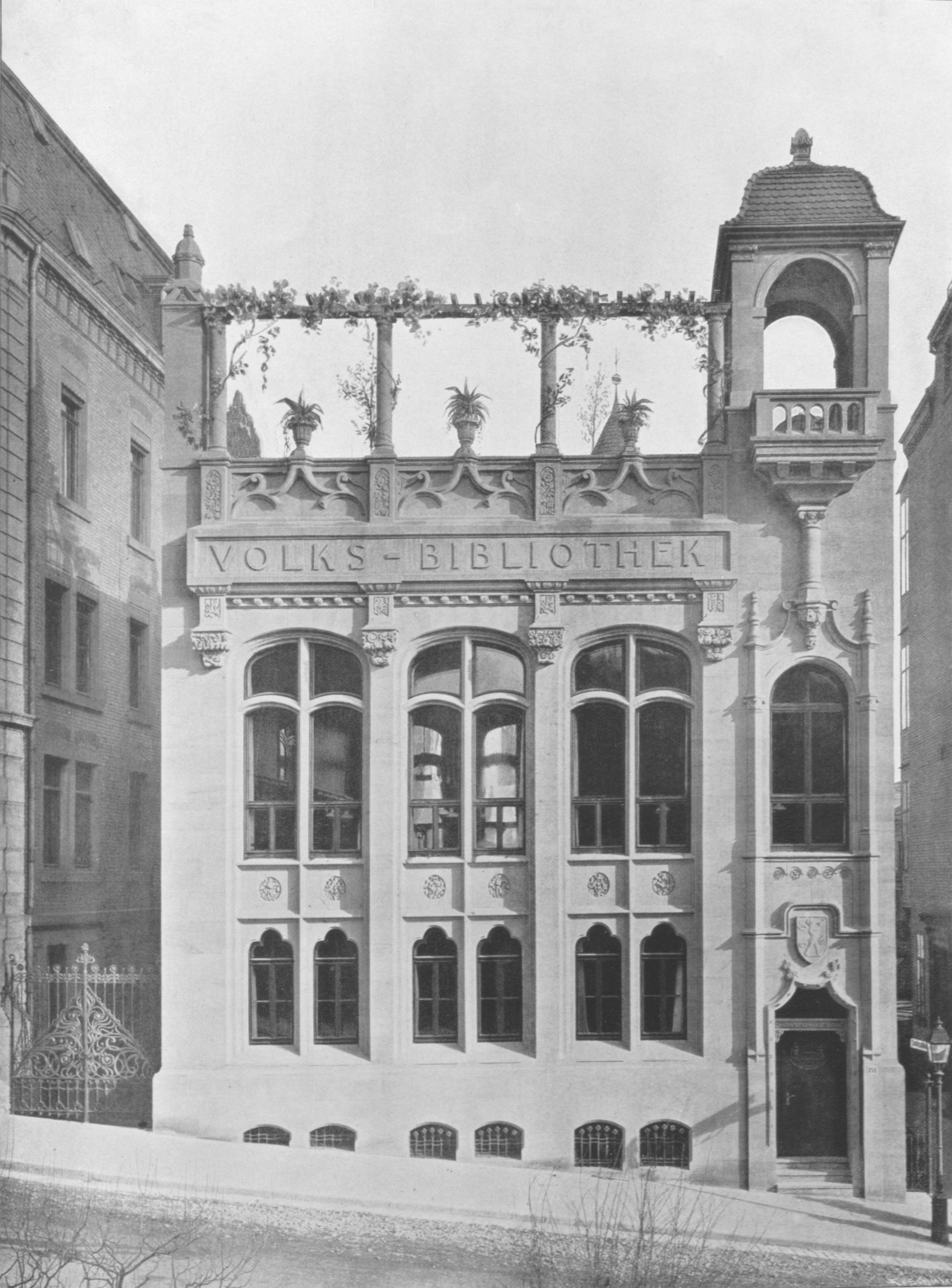 Haus der Volksbibliothek in der Silberburgstraße 191 in Stuttgart, Foto: 1902.